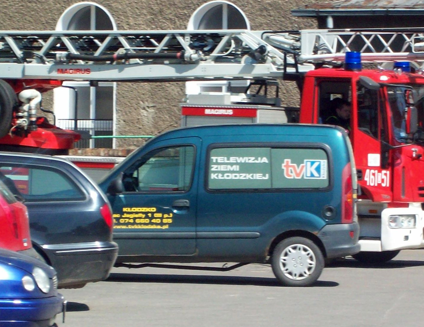 Samochód firmowy TVK Kłodzkiej